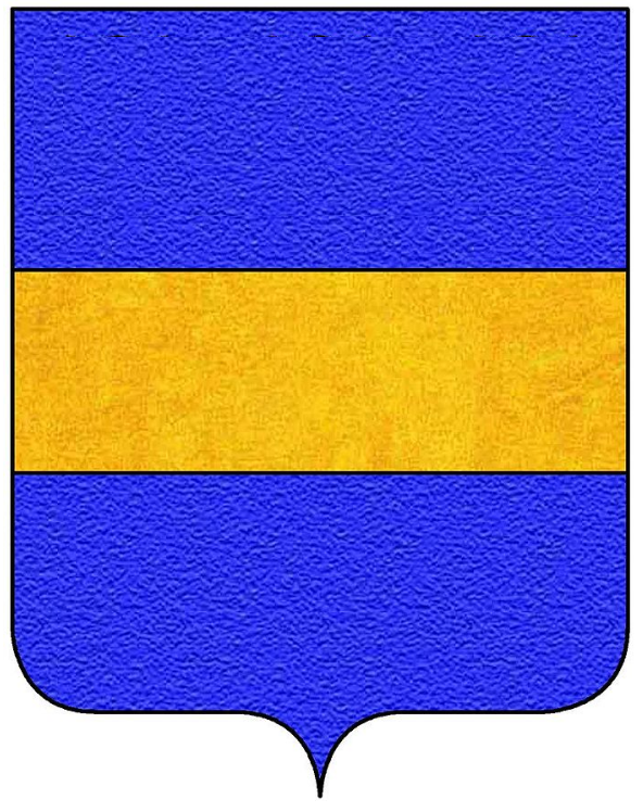 Stemma della casata perugina dei Baglioni.